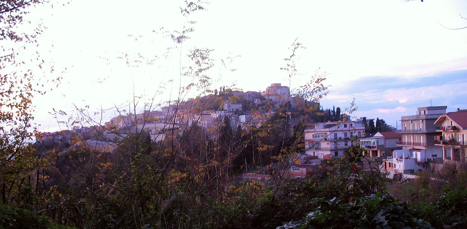 Roccavaldina view